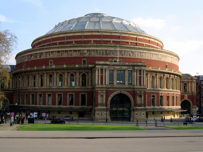 Royal Albert HallIMG_10362